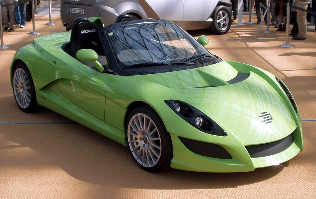 Edag Number 8